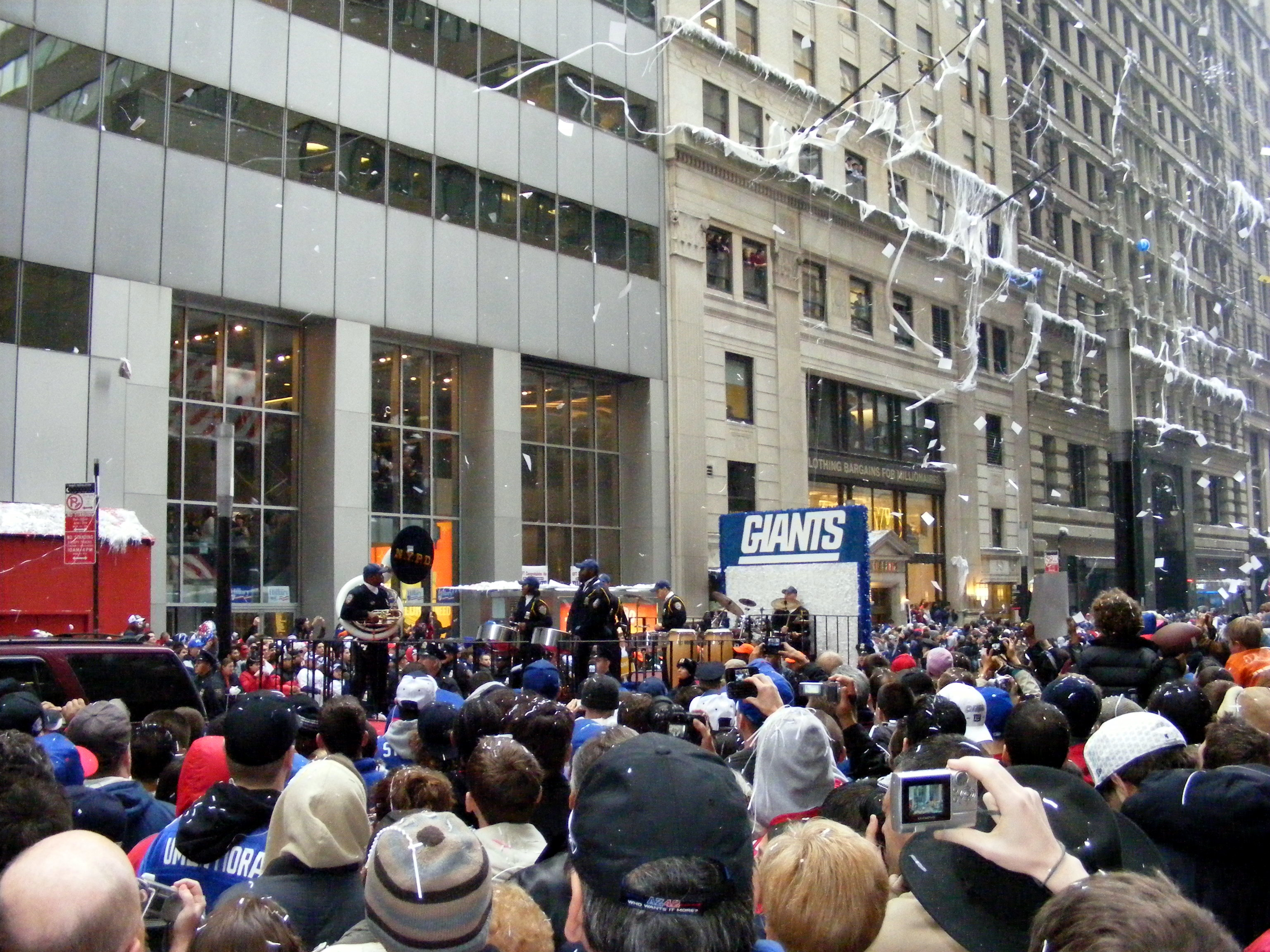 NYPD Band